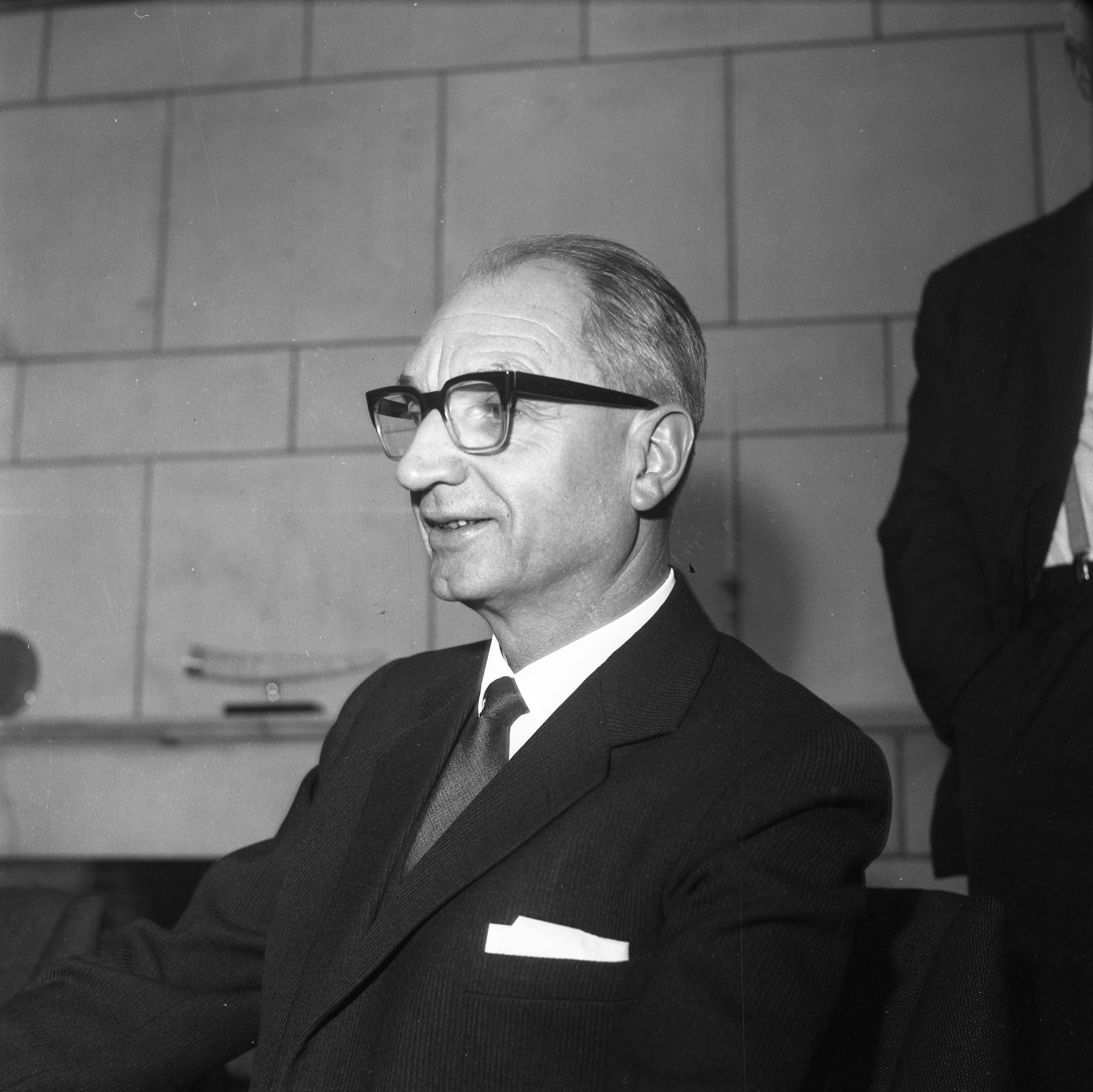 Format: 120 mm sort/hvitt negativ Dato / Date: 1967 Fotograf / Photographer: Eirik Sundvor (1902 - 1992) Sted / Place: Bergenske Dampskibsselskabs lokaler, Bergen, Hordaland Hvem er hvem? (1973): Christopher Stockinger (f. 1906) Wikipedia: Vesteraalens Dampskibsselskab Eier / Owner Institution: Trondheim byarkiv, The Municipal Archives of Trondheim Arkivreferanse / Archive reference: Tor.H43.B78.F14208 STOCKINGER Christopher, direktør, Bærum, f. 16. mars 1906 i Manchester, sønn av skipsf. Christopher S. (1868-1962) og Anna Katarina Lunde (1880-1960). Gift 1934 Synnøve Agnethe Høvik, f. 31. jan. 1910, dtr. av gross. Andreas H. (1868-1958), T.heim og Agnethe Elida Jensen (1870-1910). Middelsk. 1921, handelssk. 1923, utenlandsopphold. Befrakter Bergenske Baltic Transports Ltd., Danzig 1928, kontorsjef samme rederis Gdyniakontor 1931-39, sekr. Skipsfartsdirekt. 1941, kontorsjef Vesteraalens Dampskibsselskab 1945, adm. dir. der 1950, adm. dir. Berg-Hansen & Co. A/S, Oslo siden 1966. Tidl. form. Nord-Norges krets av Norges Rederforb., medl. Skibsfartens Arb.giverfor.s råd. Styremedl. Dampskibseksp. Arb.giverforening.